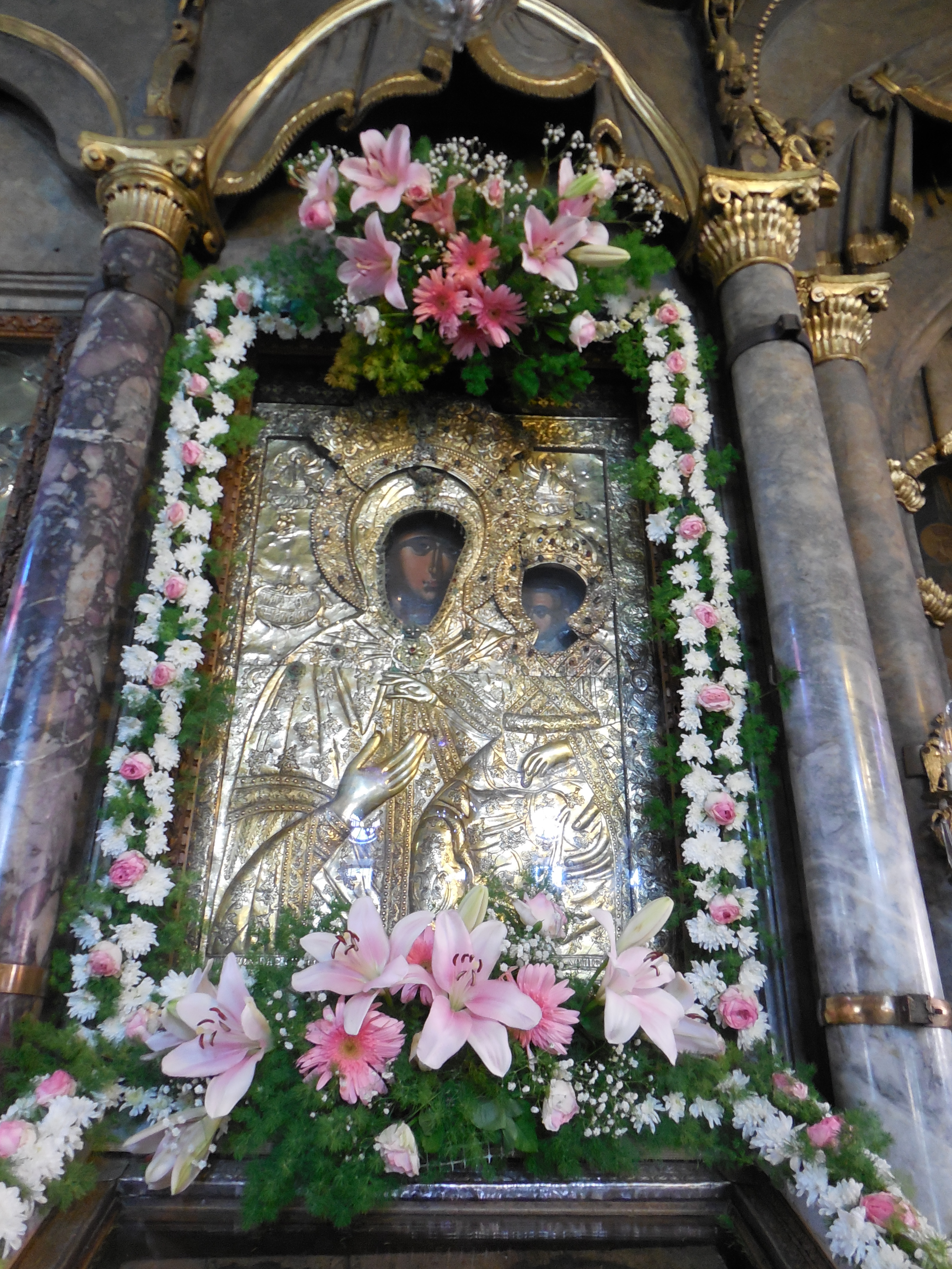 Икона Пресвятой Богородицы в Айясосе